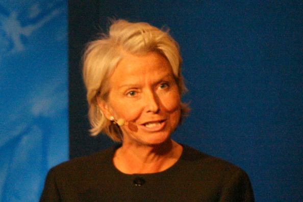 Berit Kjøll, bedriftsleder (Flytoget, Steen og Strøm m.fl.). Fra NHOs Årskonferanse 2009.